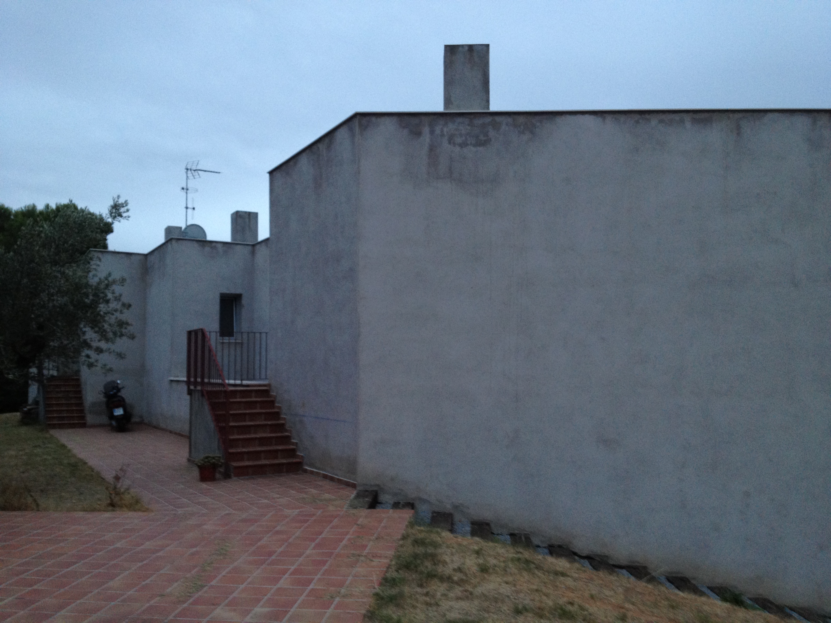 L'edifici inventariat amb l'IPA-28374 va ser enderrocat a la dècada del 2000. La casa unifamiliar de la imatge al carrer Sant Sebastià, 24 (l'Ametlla del Vallès) correspon a la construcció actual, NO PROTEGIDA.